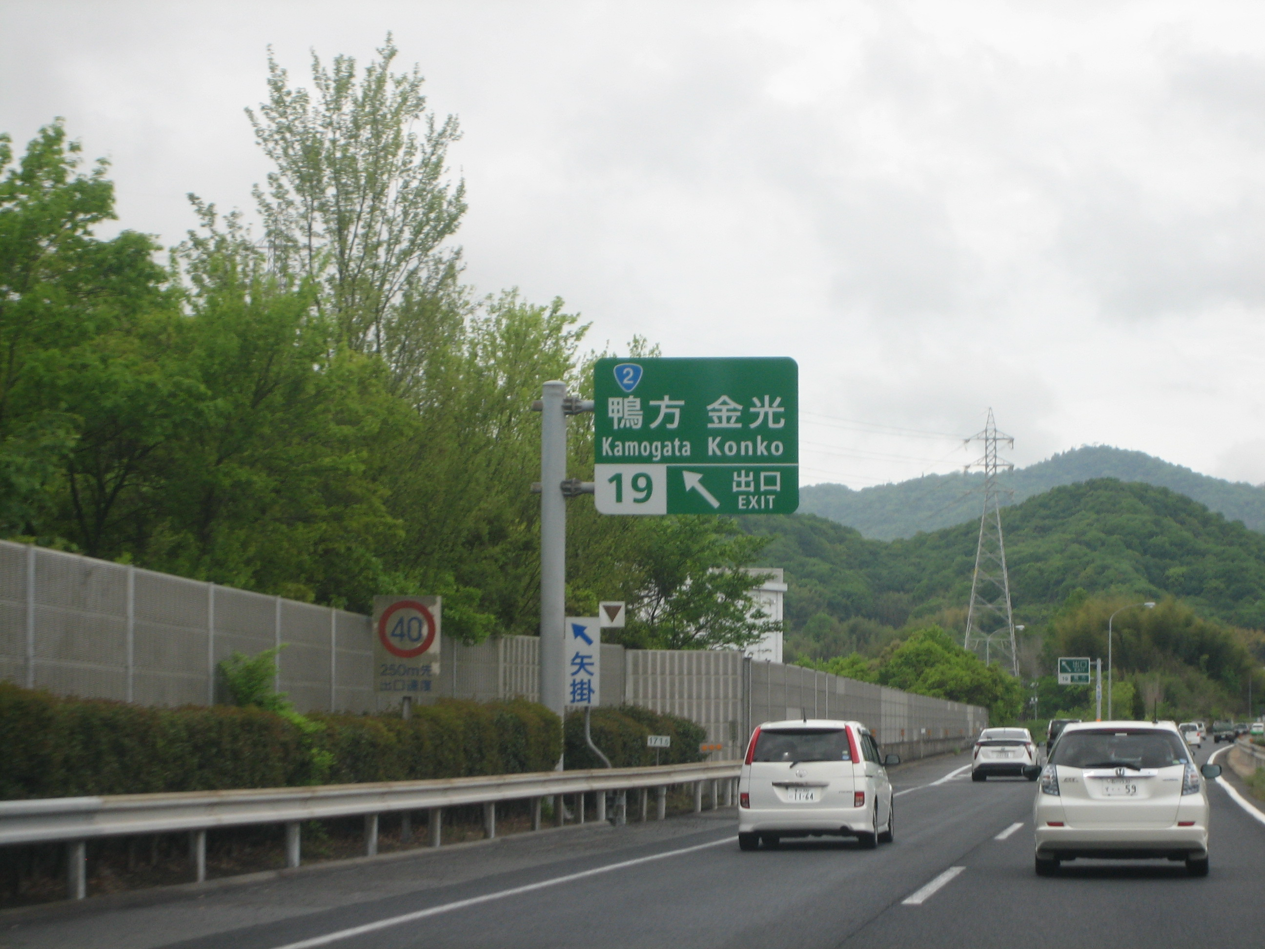 鴨方IC